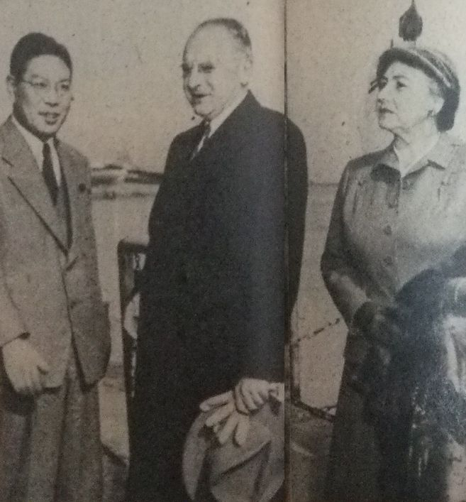 ドッジ夫妻と池田勇人